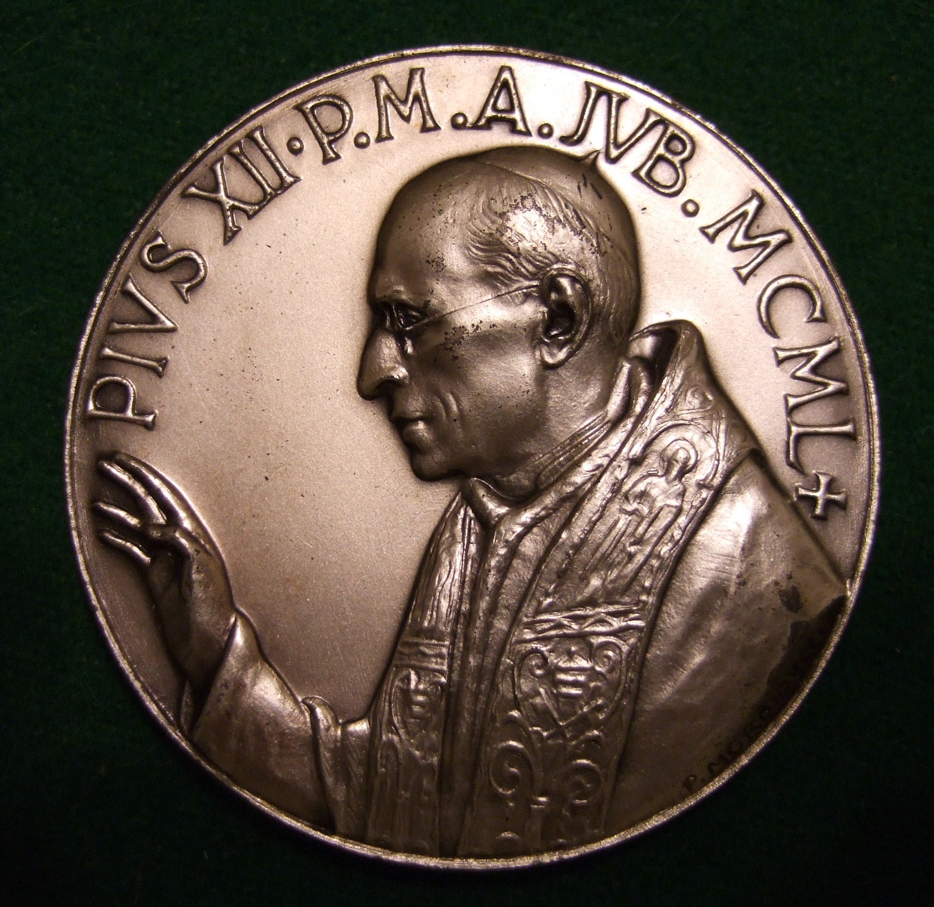 POPE PIUS XII 1950 MID CENTURY MEDALLION a